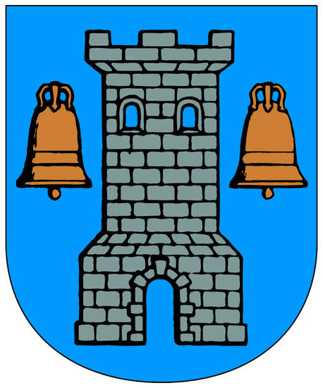 Shield of Tårnby Municipality (2007)